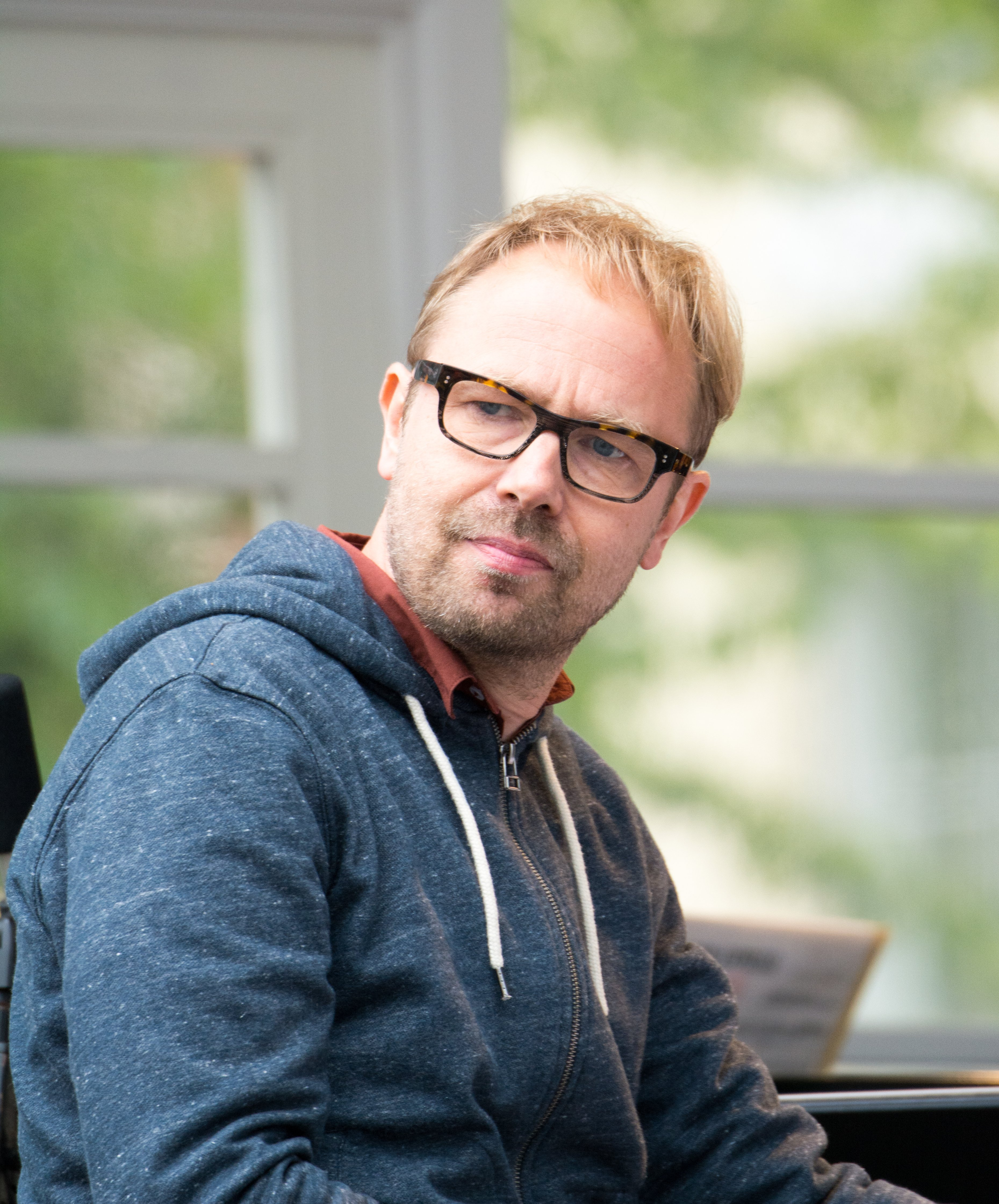 Kari Heinilä suomalainen pianonsoittaja